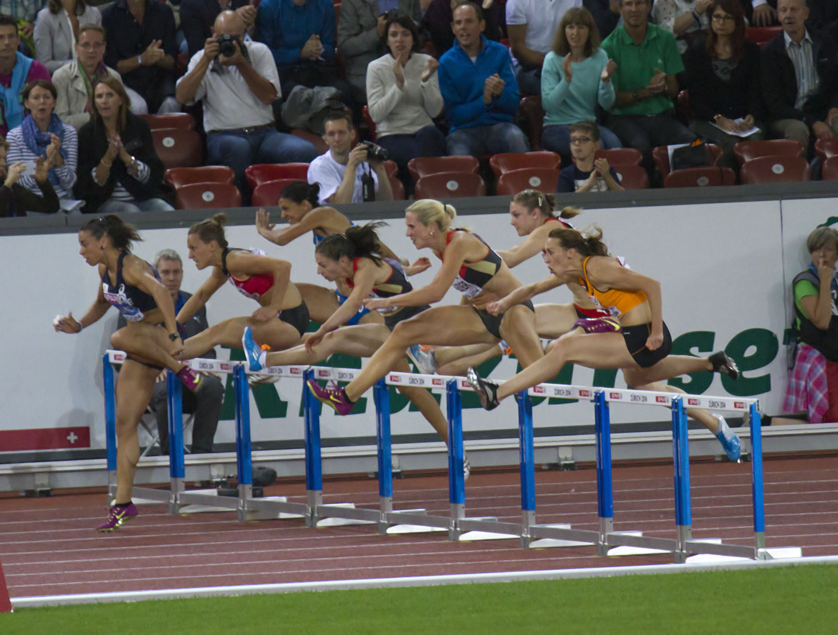 246 eline berings halve finale 100mH